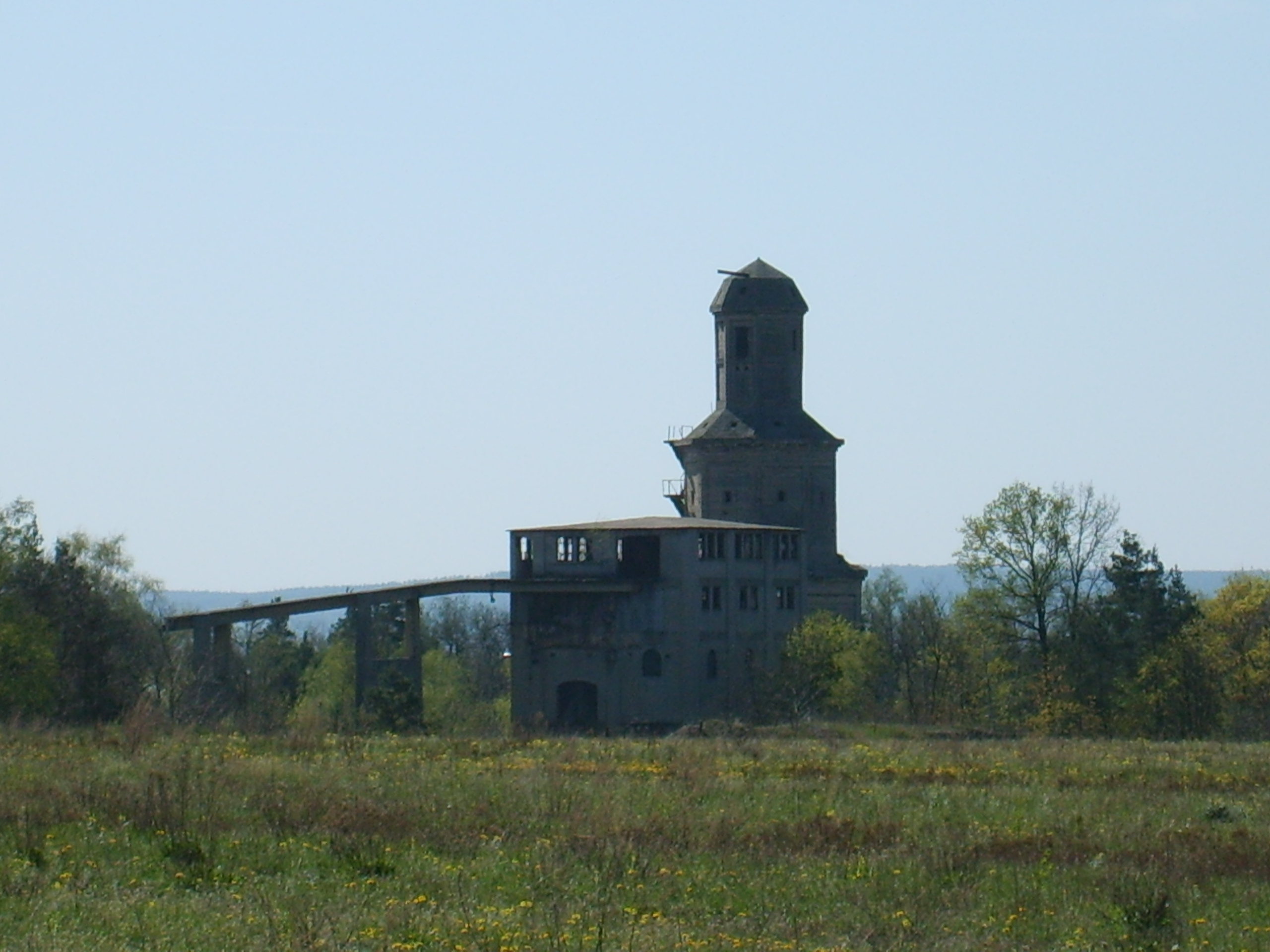 Hinteransicht vom Berzitturm in Kahla (Elbe-Elster)